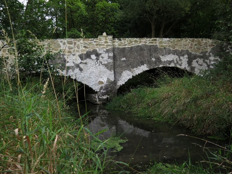 Silniční most, přes Závišínský potok, Závišín (Bělčice).